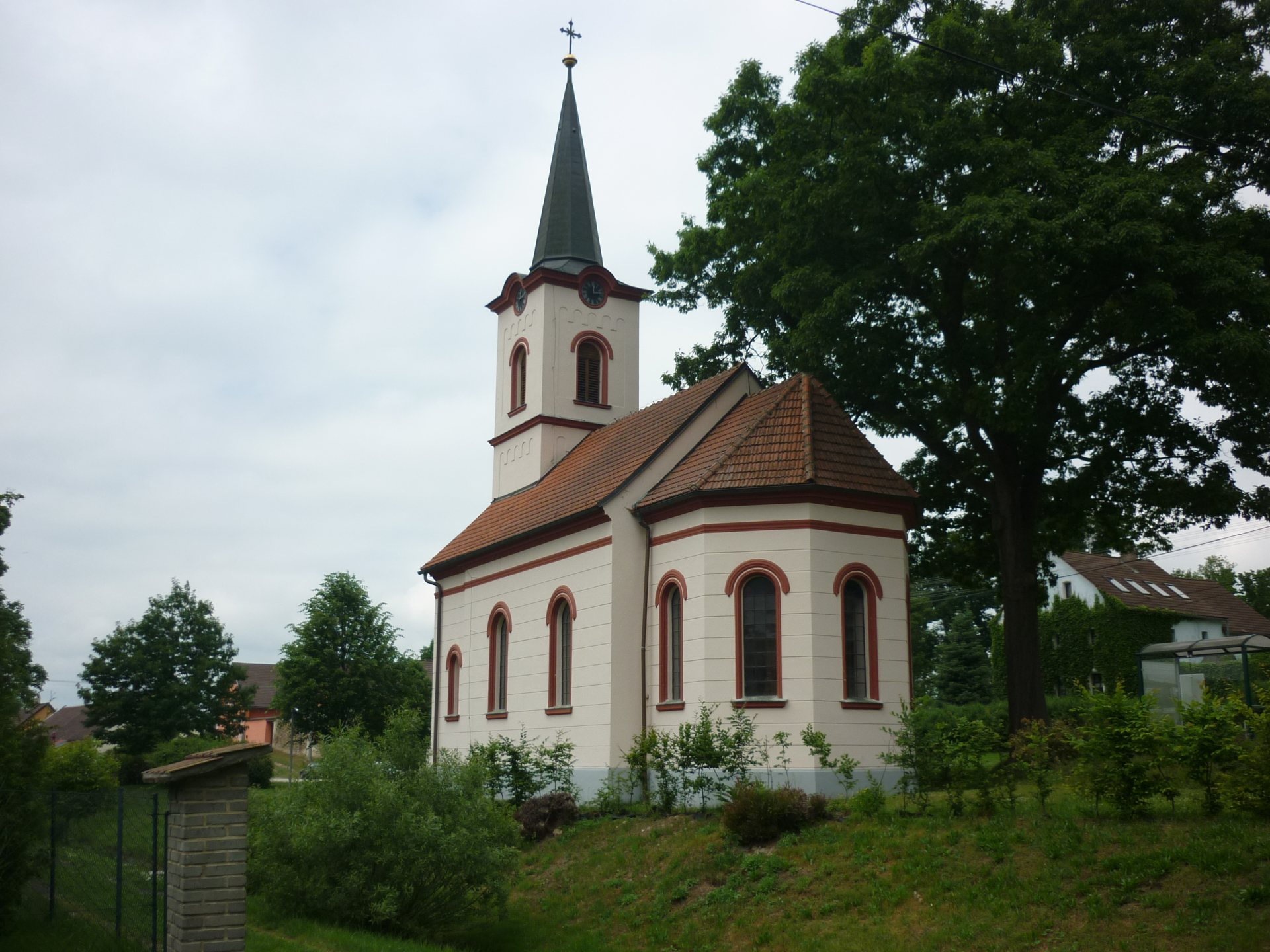 Dolní Pěna - Kaple Nejsvětějšího srdce Páně